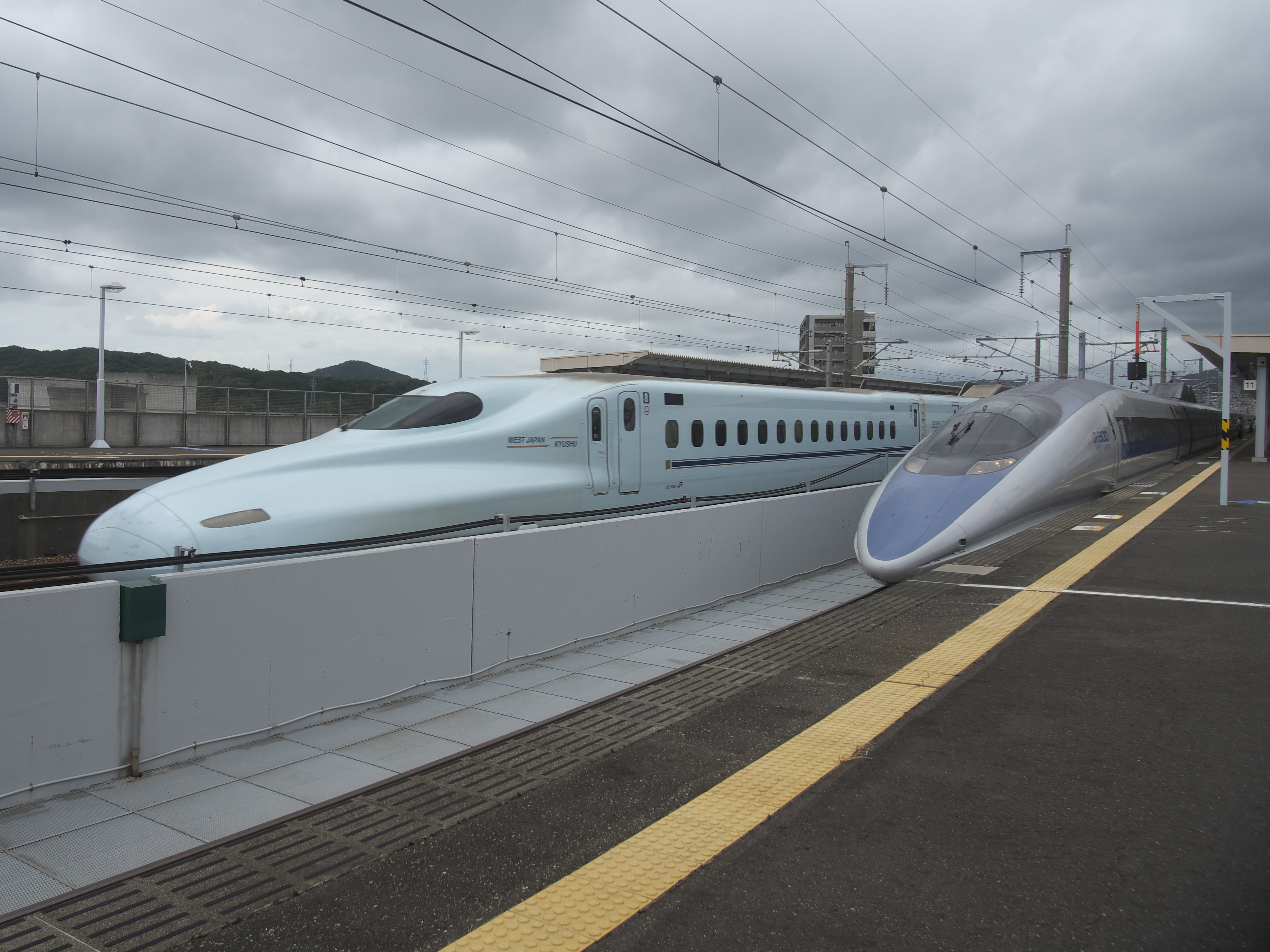 厚狭駅で撮影。